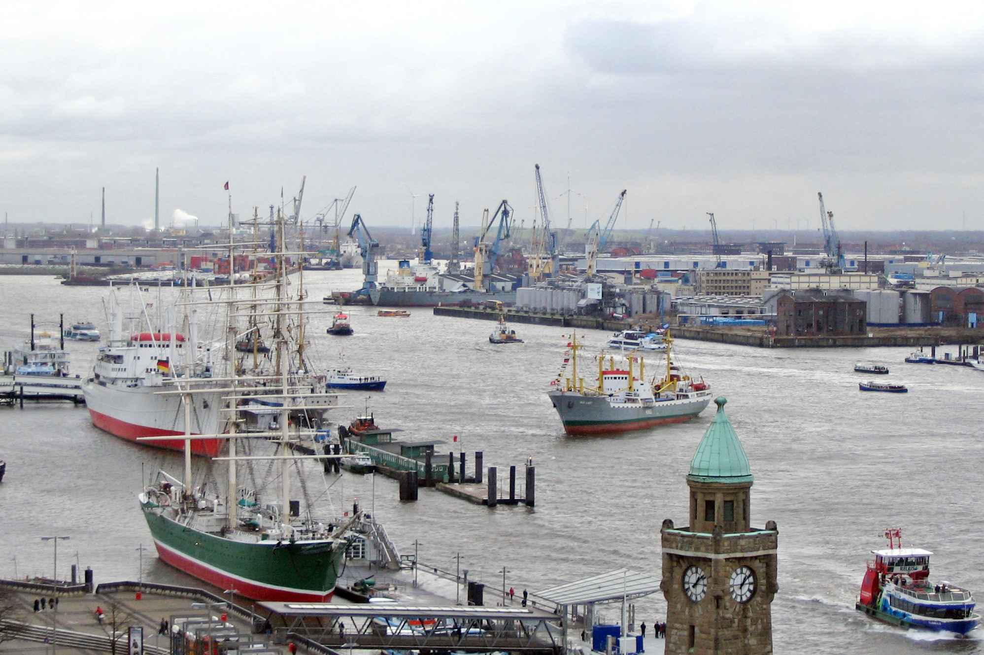 Museumsschiff Old Lady, Ankunft Hamburg